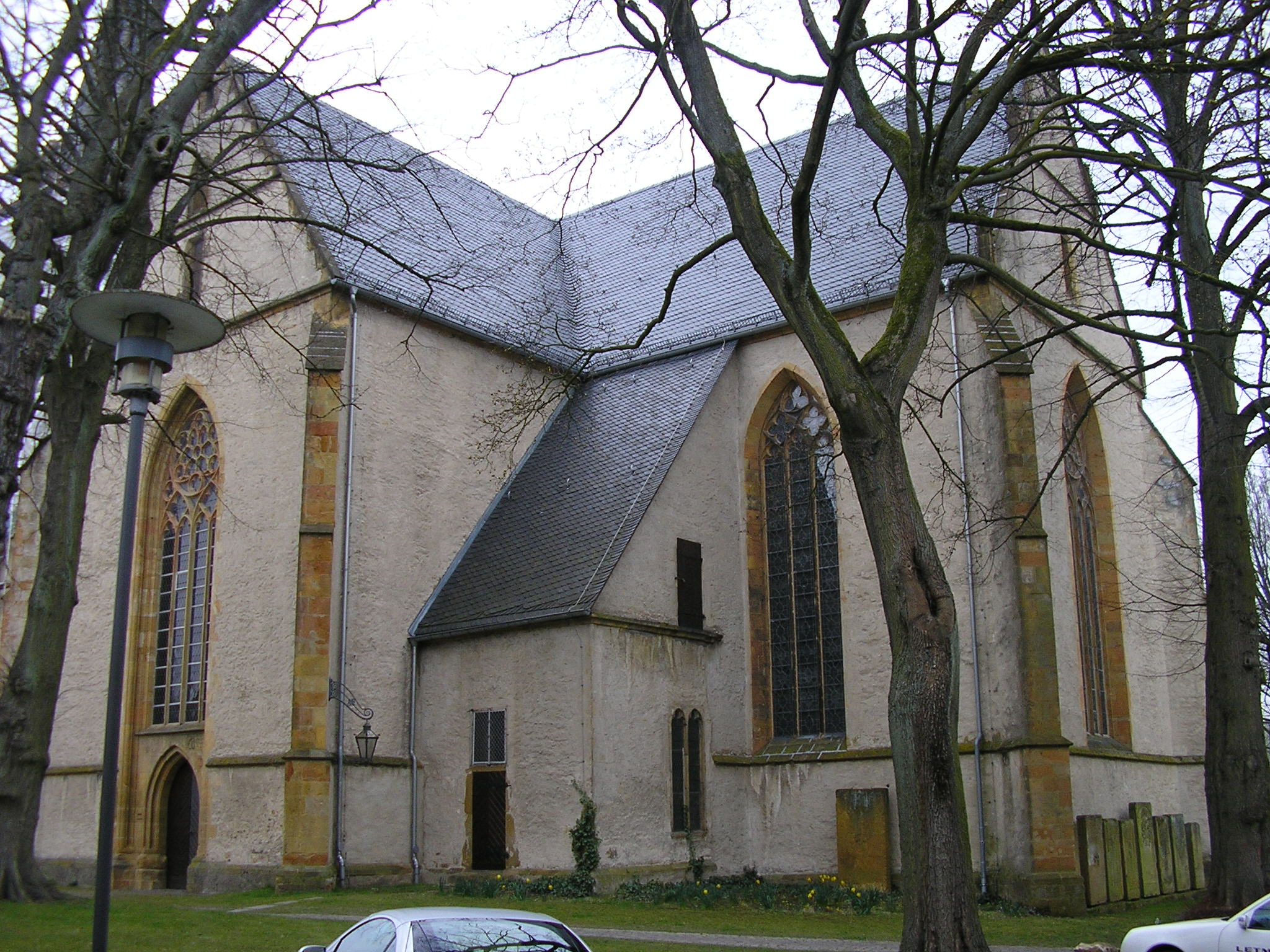 evang.-luth. Stiftskirche St. Johannes zu Bielefeld-Schildesche